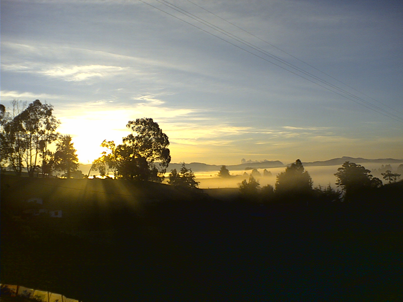 Amanecer en el Alto de La Union